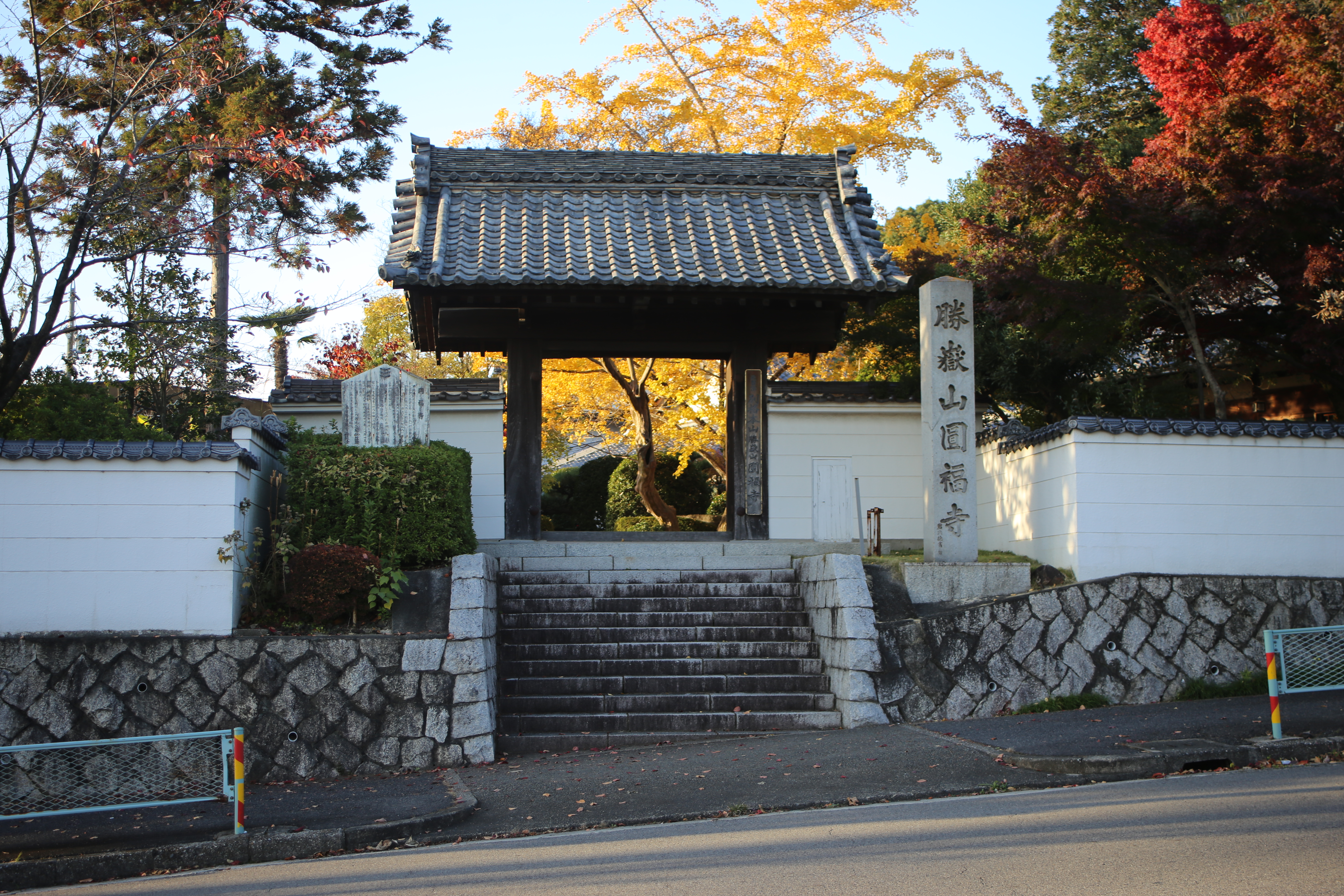 愛知県春日井市白山町の勝嶽山円福寺